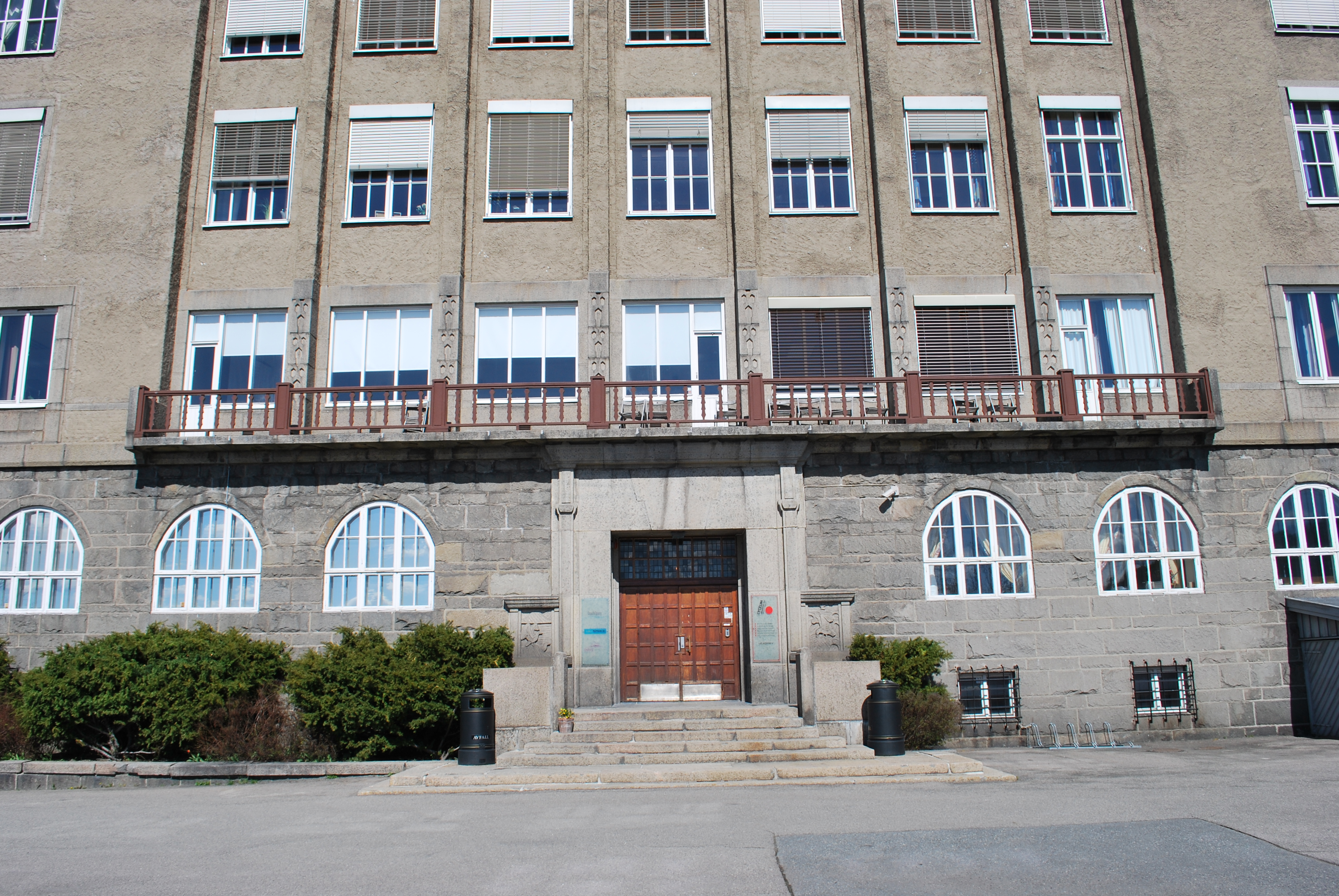 Sjømannsskolen, Ekeberg, Oslo, inngangspartiet